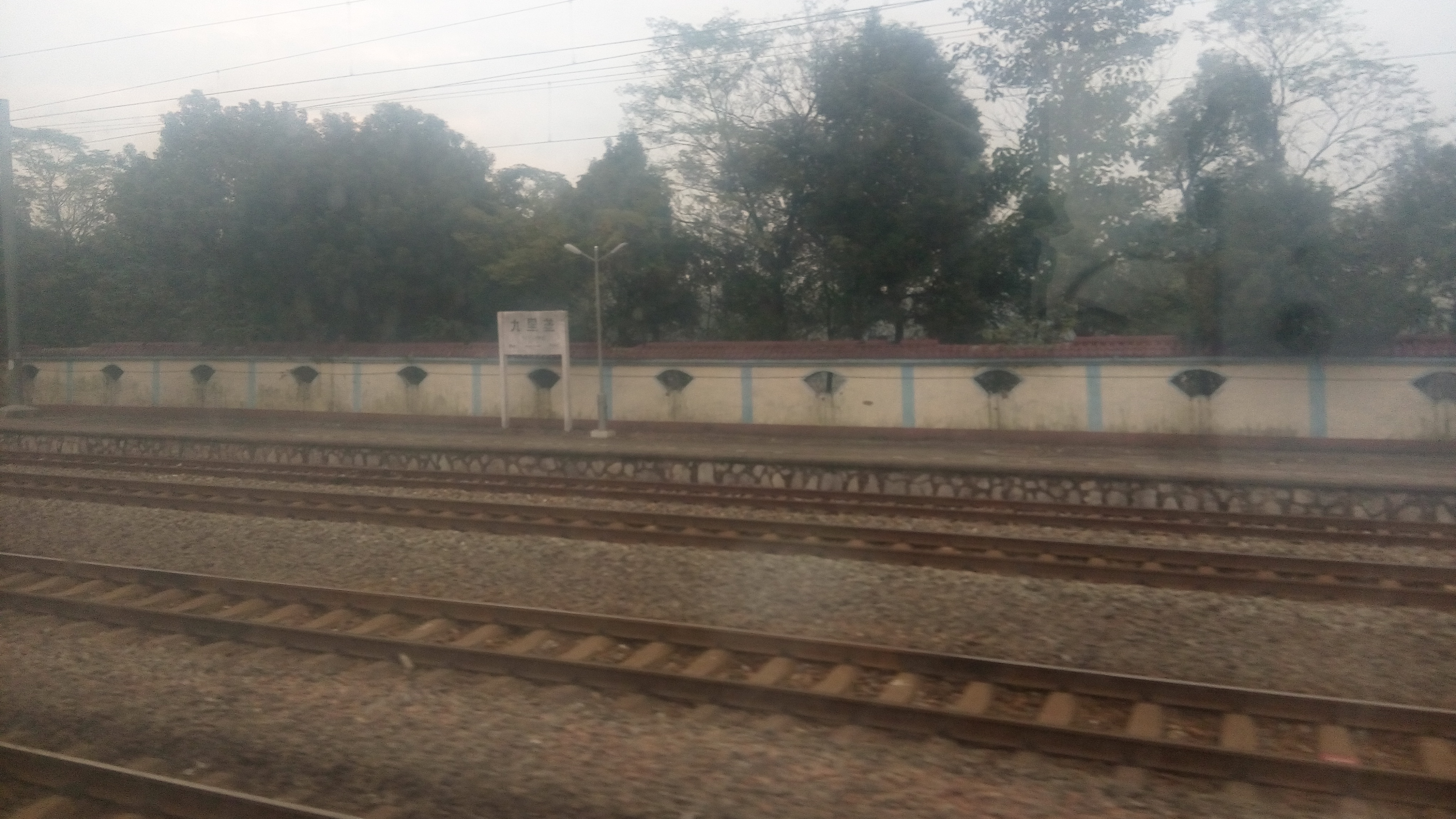 九里垄站台